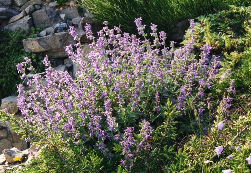 Nepeta × faassenii